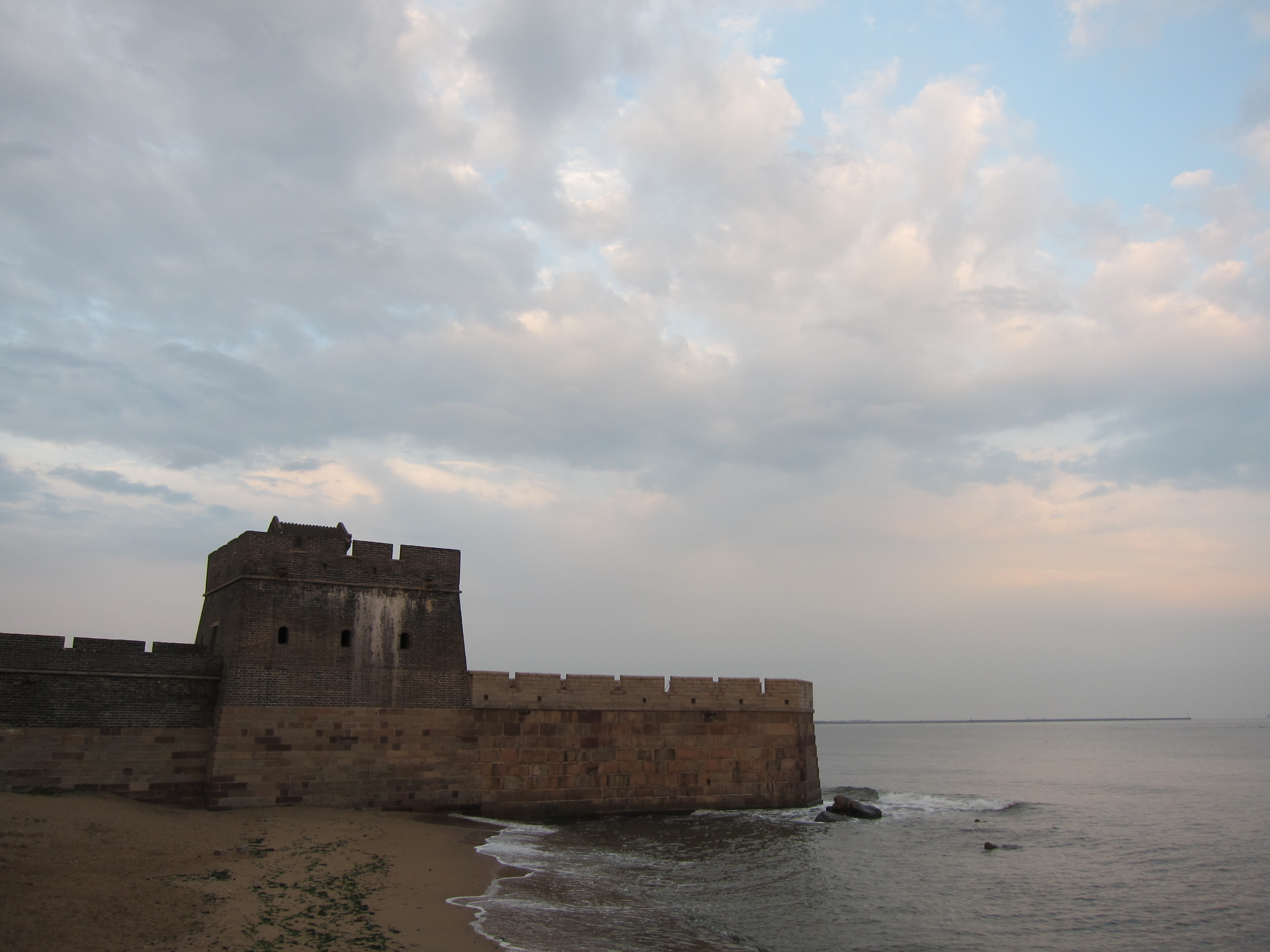 中文（中国大陆）: 山海关老龙头入海石域